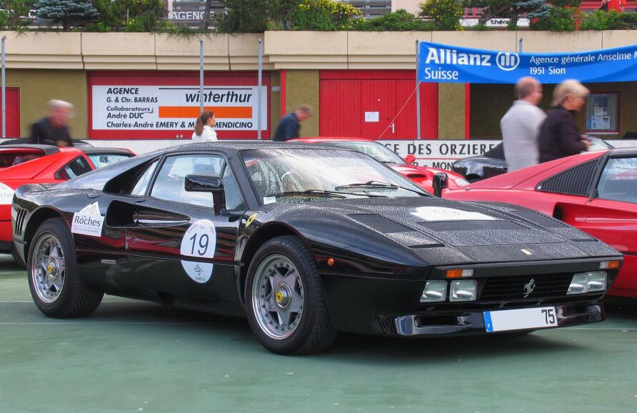 1984-er Ferrari 288 GTO Bild wird freundlicherweise von zur Verfügung gestellt. Autor: Matteo "TT" Stucchi Genehmigung: per E-Mail vom 9.2.2006 mit Billigung der "creative commons"-Lizenz